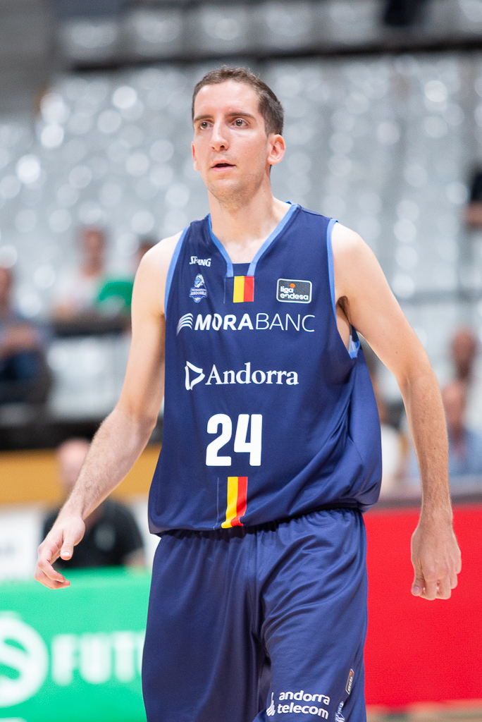 Guillem Colom en un partido de la Liga Catalana 2019 en el Olímpico de Badalona.